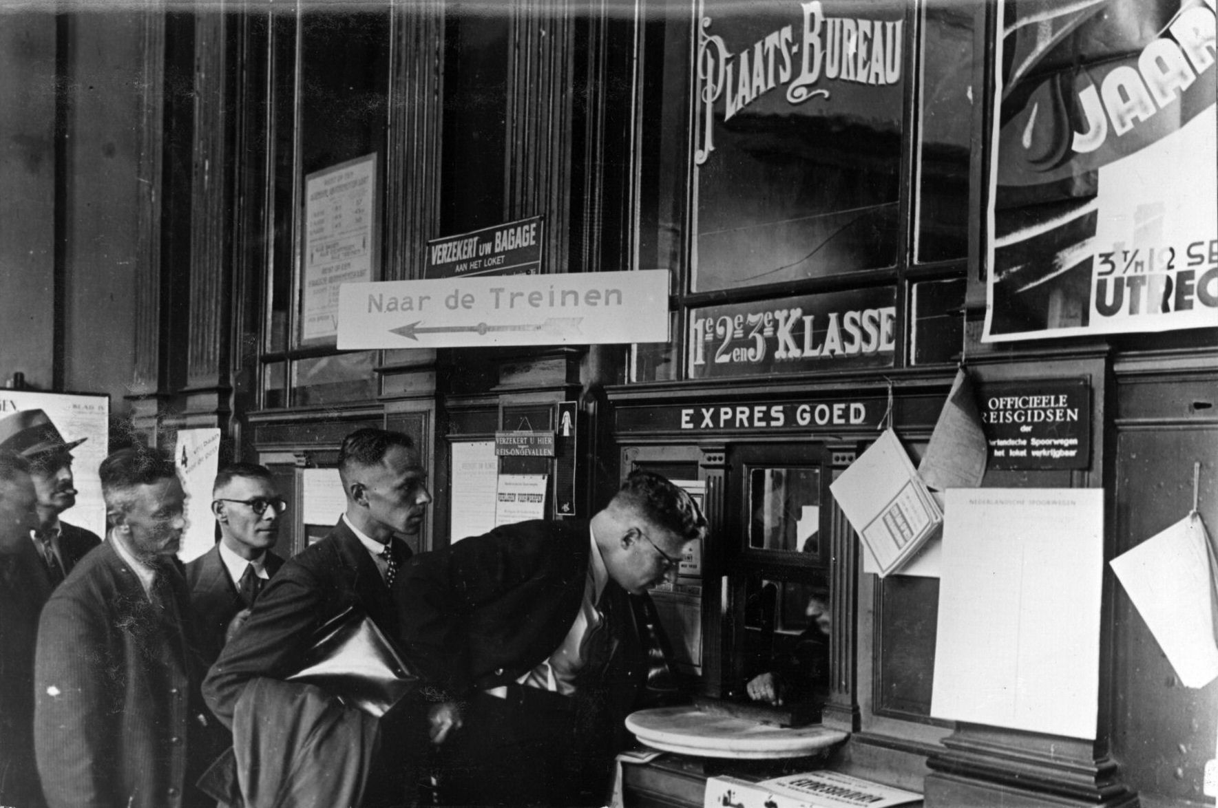 Afbeelding van reizigers bij het loket van het N.S.-station Utrecht Maliebaan te Utrecht.